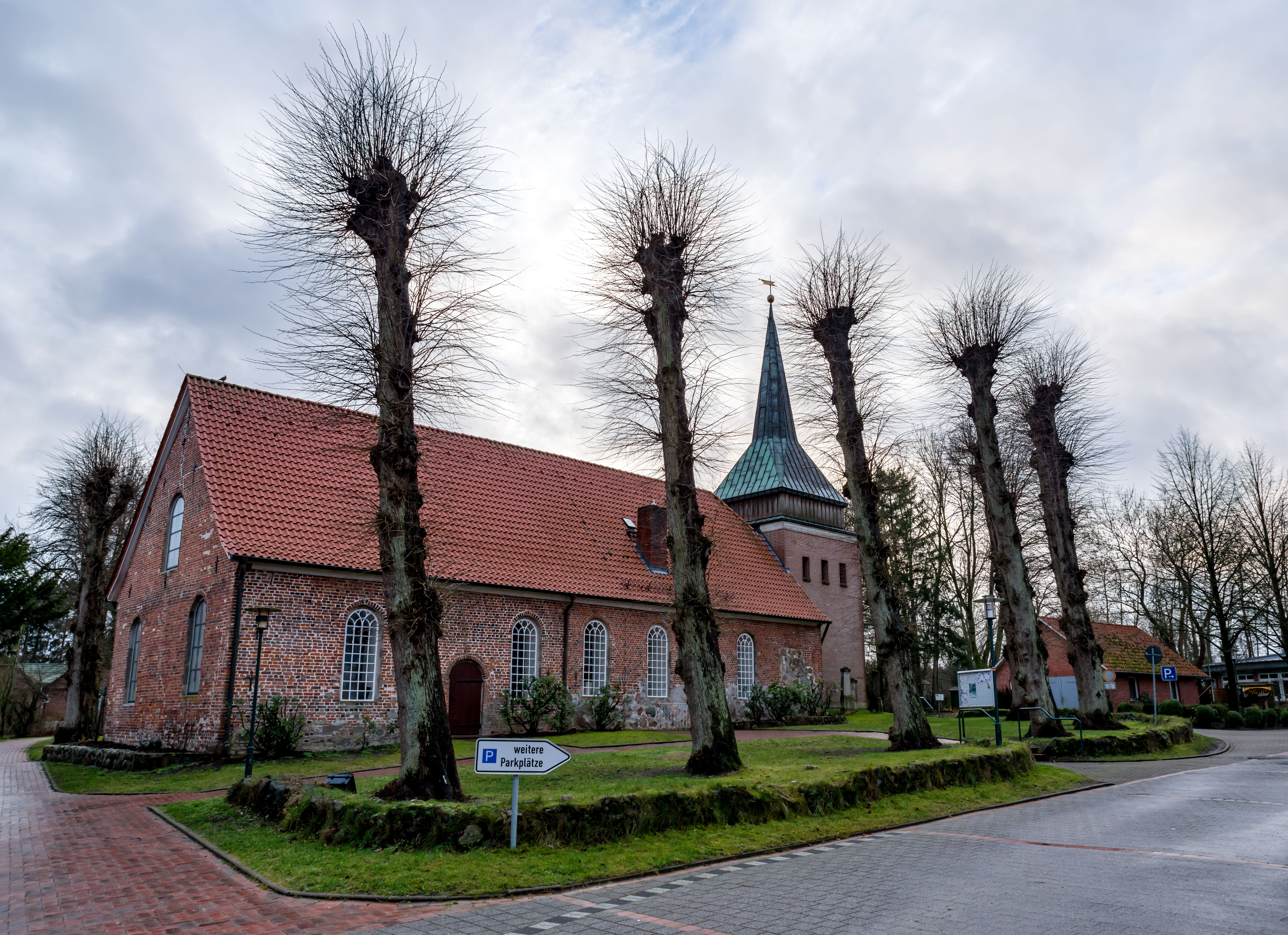 St. Marienkirche von 1384 in Hechthausen, Niedersachsen, Deutschland